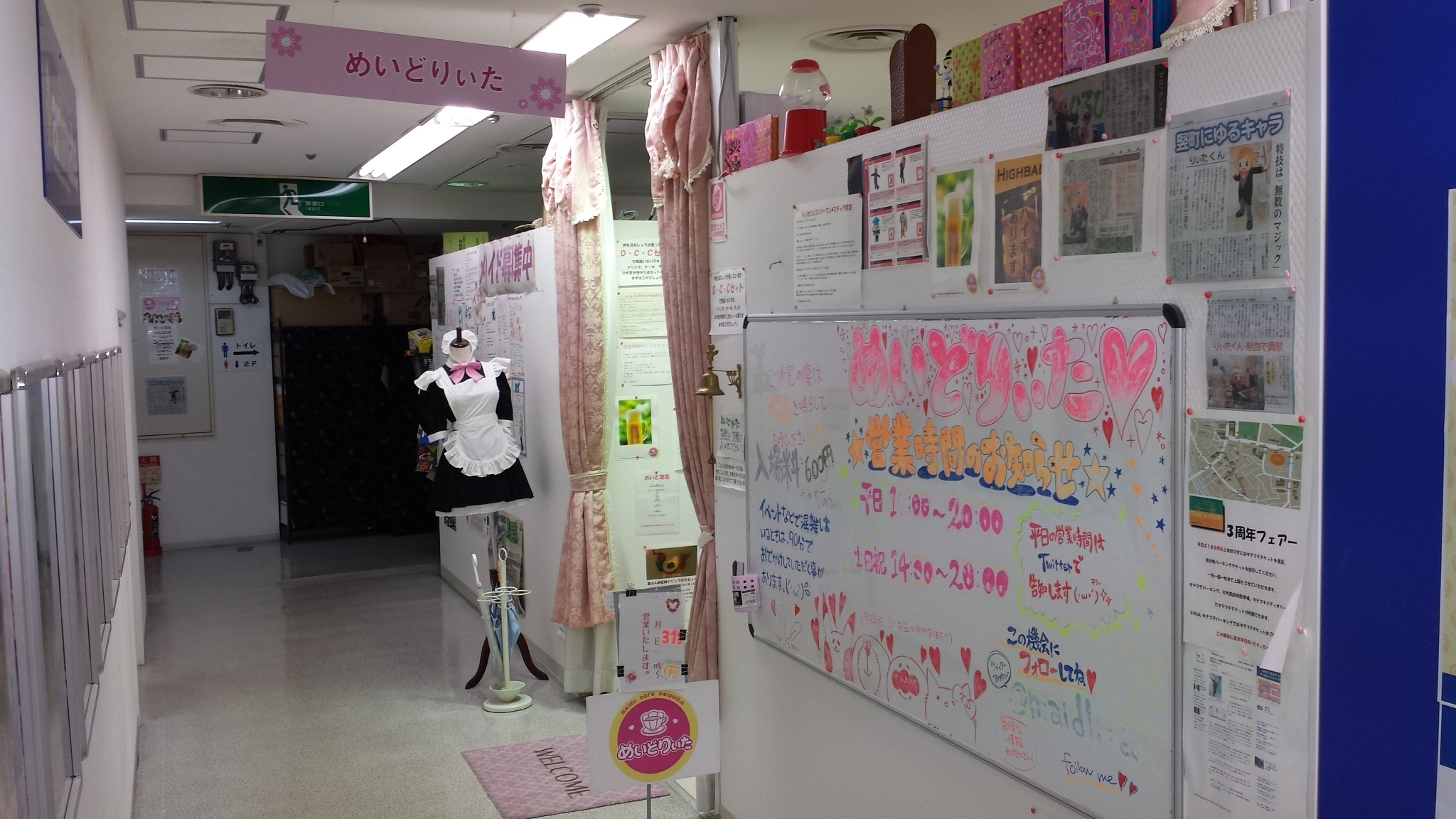 めいどりぃた店外様子